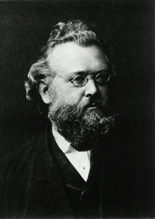 Friedrich Klopfleisch (1831-1898);* Quelle: Fotoarchiv des Bereichs für Ur- und Frühgeschichte der FSU Jena